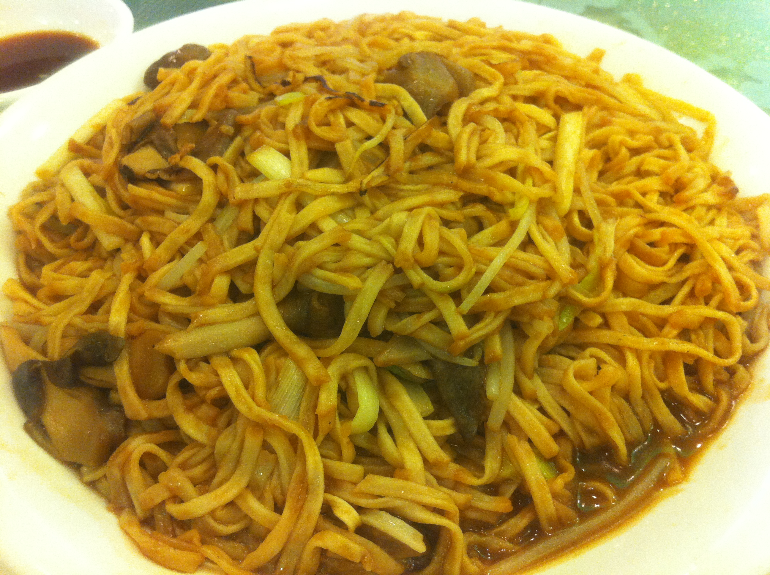 中文（香港）: 中式食品 乾燒伊麵